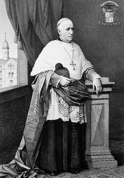 Eugene Lachat, Bischof von Basel